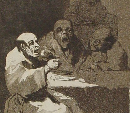 Están calientes.-Detalle 1 del Capricho nº 13: Francisco Goya y Lucientes, Pintor de Goya, serie Los Caprichos